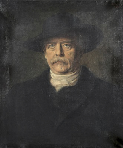 Porträt Otto von Bismarck mit schwarzem Hut